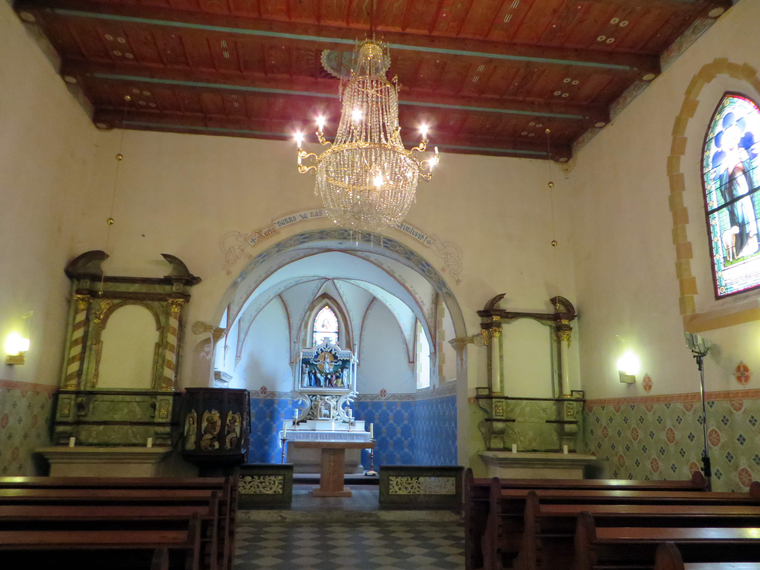 Kostel Nanebevzetí Panny Marie, Zámostí, st. 3906, st. 3905, pp. 3907, Poděbrady I, Poděbrady.